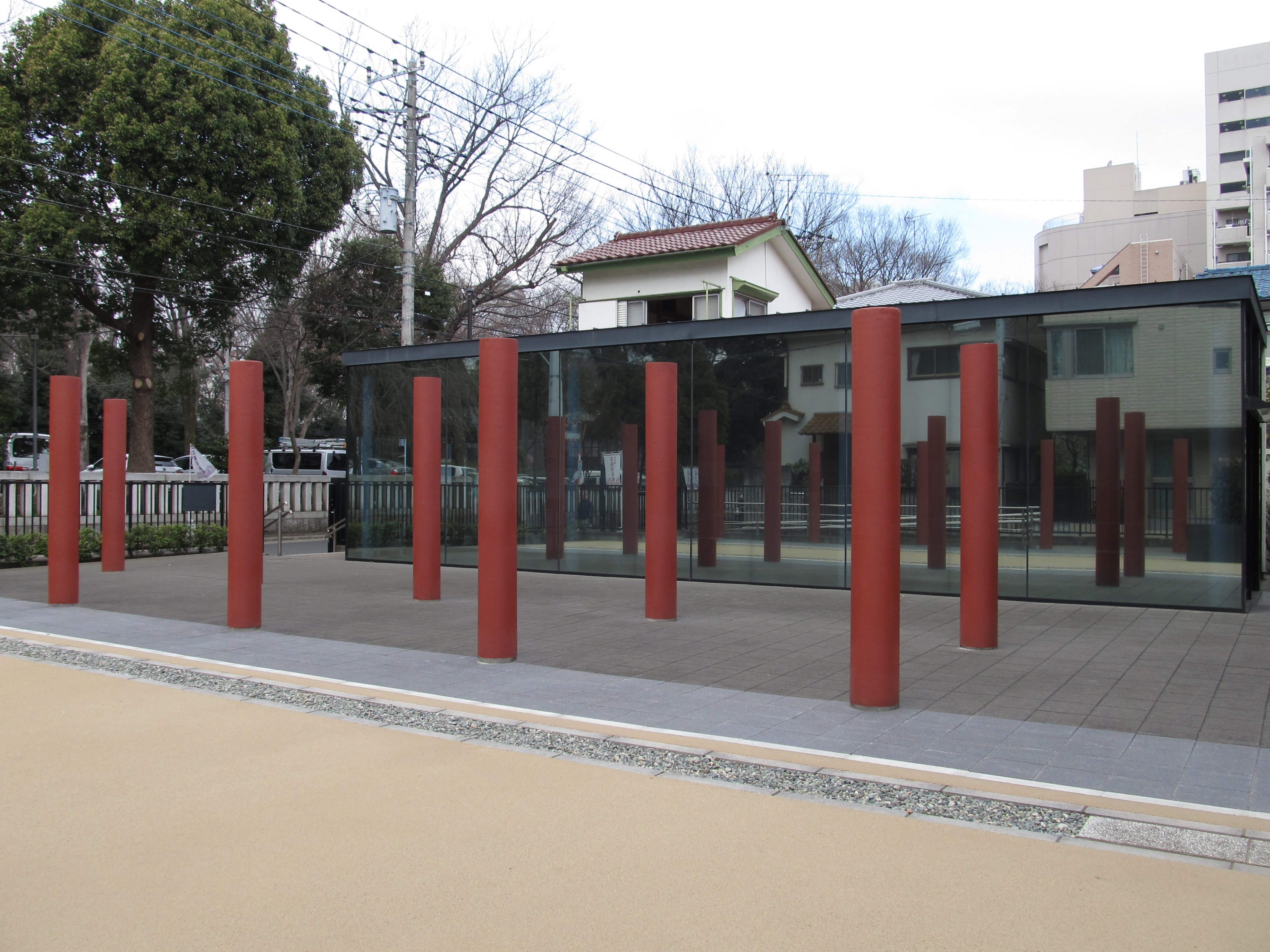 史跡武蔵国府跡（国衙）